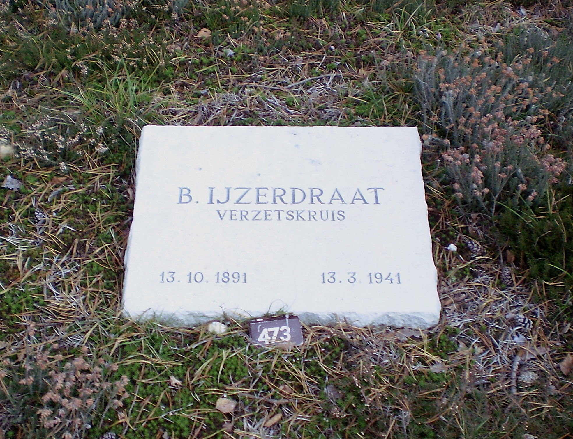 Grafsteen voor Bernardus IJzerdraat (1891-1941), een gefusilleerde verzetsman uit de Tweede Wereldoorlog, op het Ereveld Loenen, NL